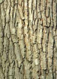 Oak bark